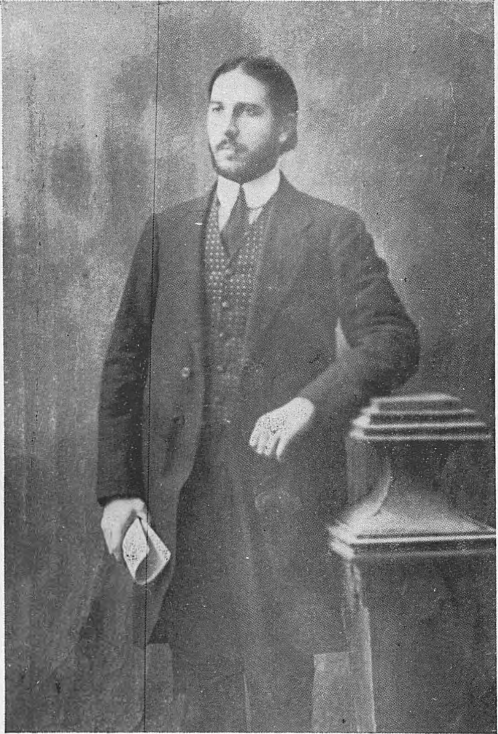 "İştirakçi" Hüseyin Hilmi Bey, erken dönem Türk sosyalistlerinden. Fotoğrafın arkasındaki yazı: "İstanbul Muhafızlığı Karakolunda Bulunduğum Hengamın Hatırasını Hakikatperver Kardeşime Takdim Ediyorum. 4 Teşrinisani 329 Kardeşiniz İştirakçi Hüseyin Hilmi"